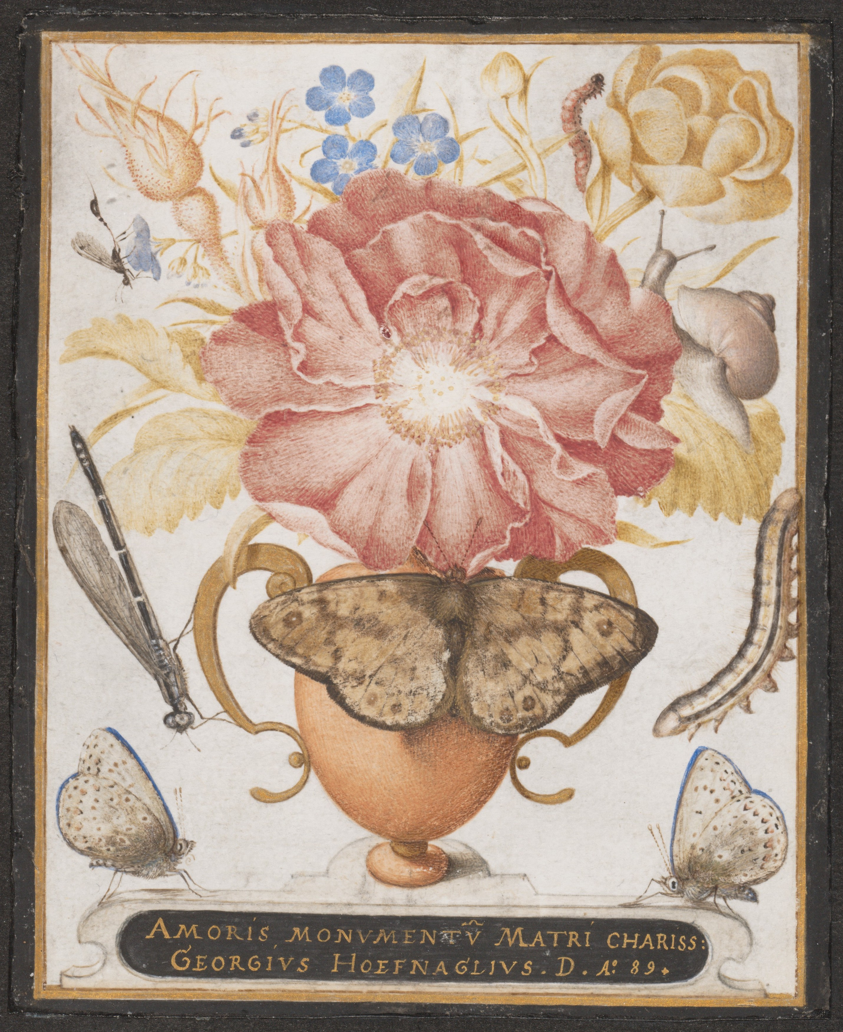 Drawing; Drawings